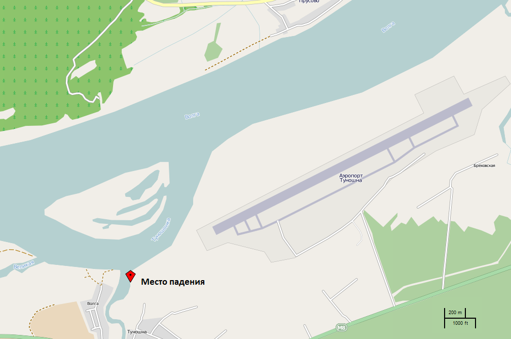 Схема места падения Як-42